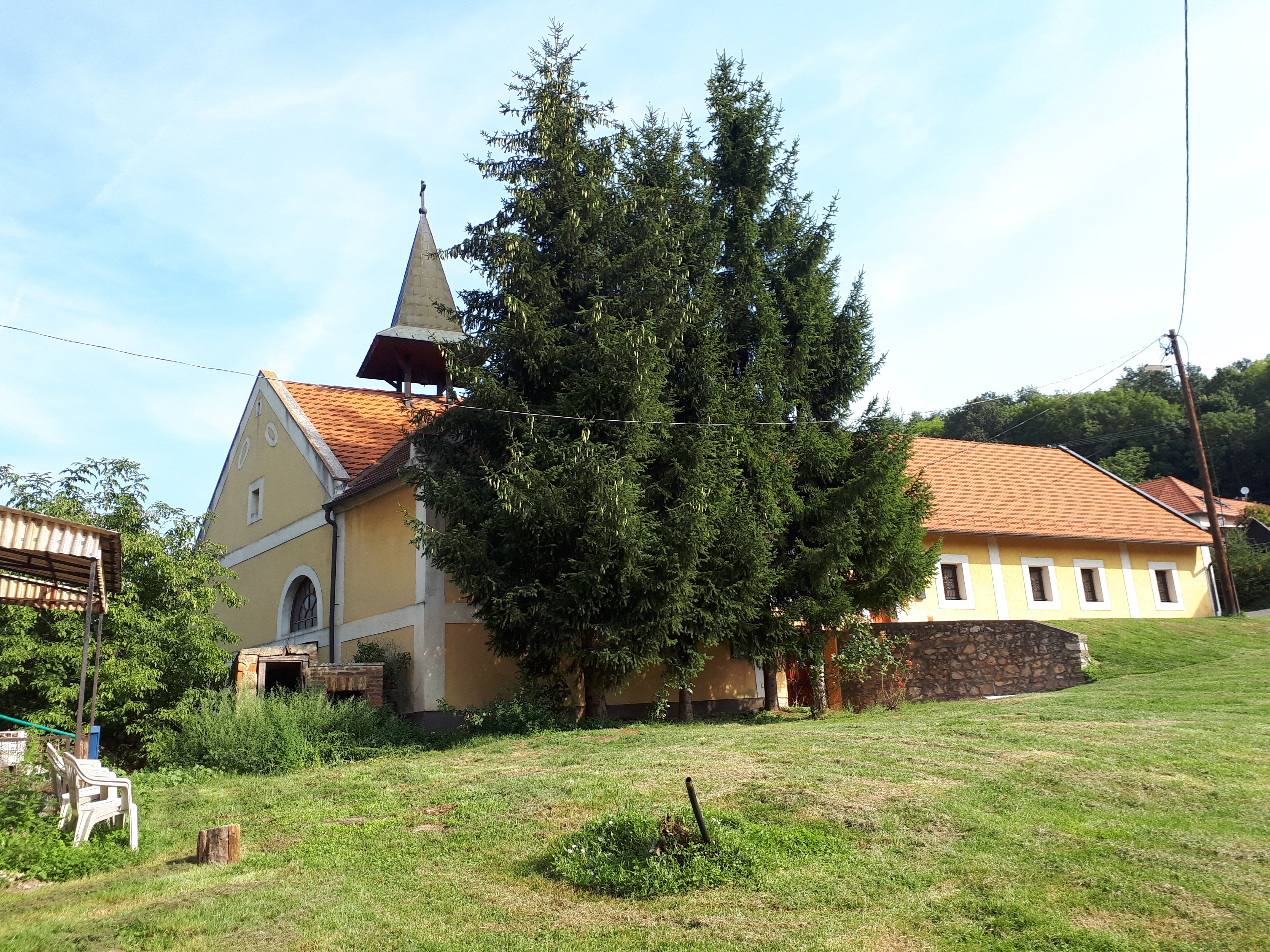 Az 1793-ban épült Szent Bernát-kápolna Eplényben